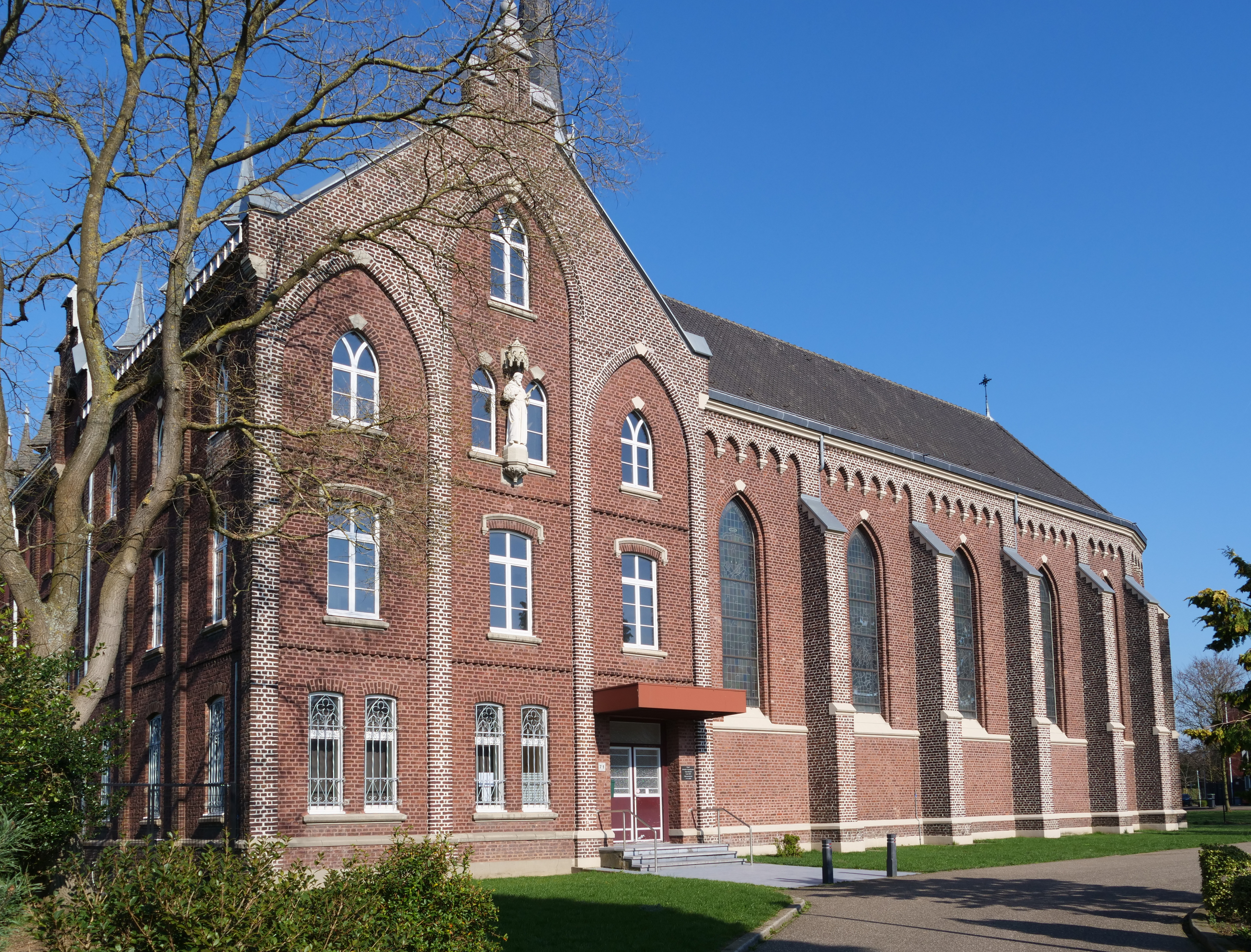 Kloster Maria von den Engeln; Südseite des Klosters mit Klosterpforte und Kapellenbau (Zustand 2019)